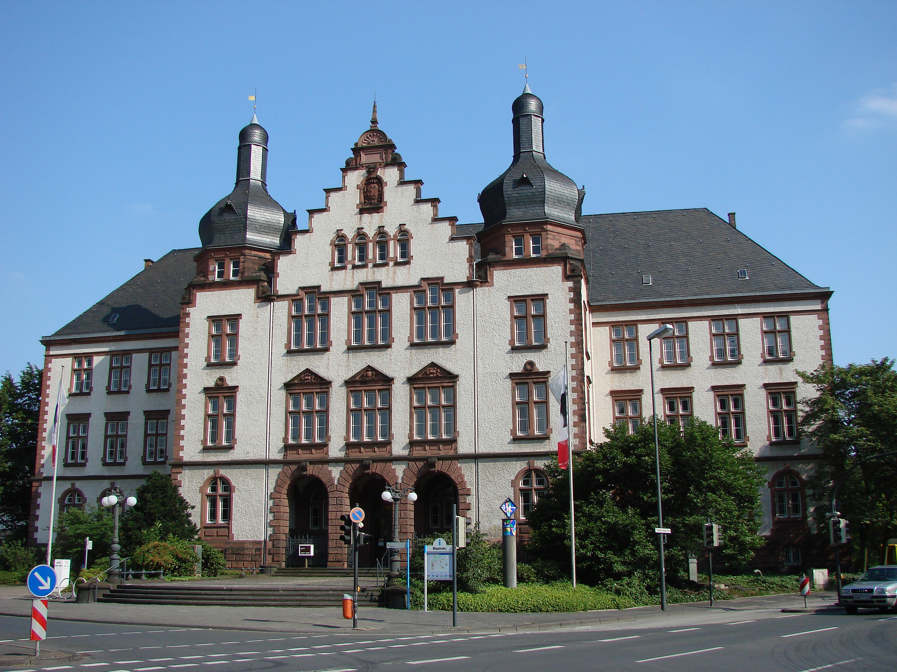 Rathaus Hamm, Nordrhein-Westfalen, Deutschland.